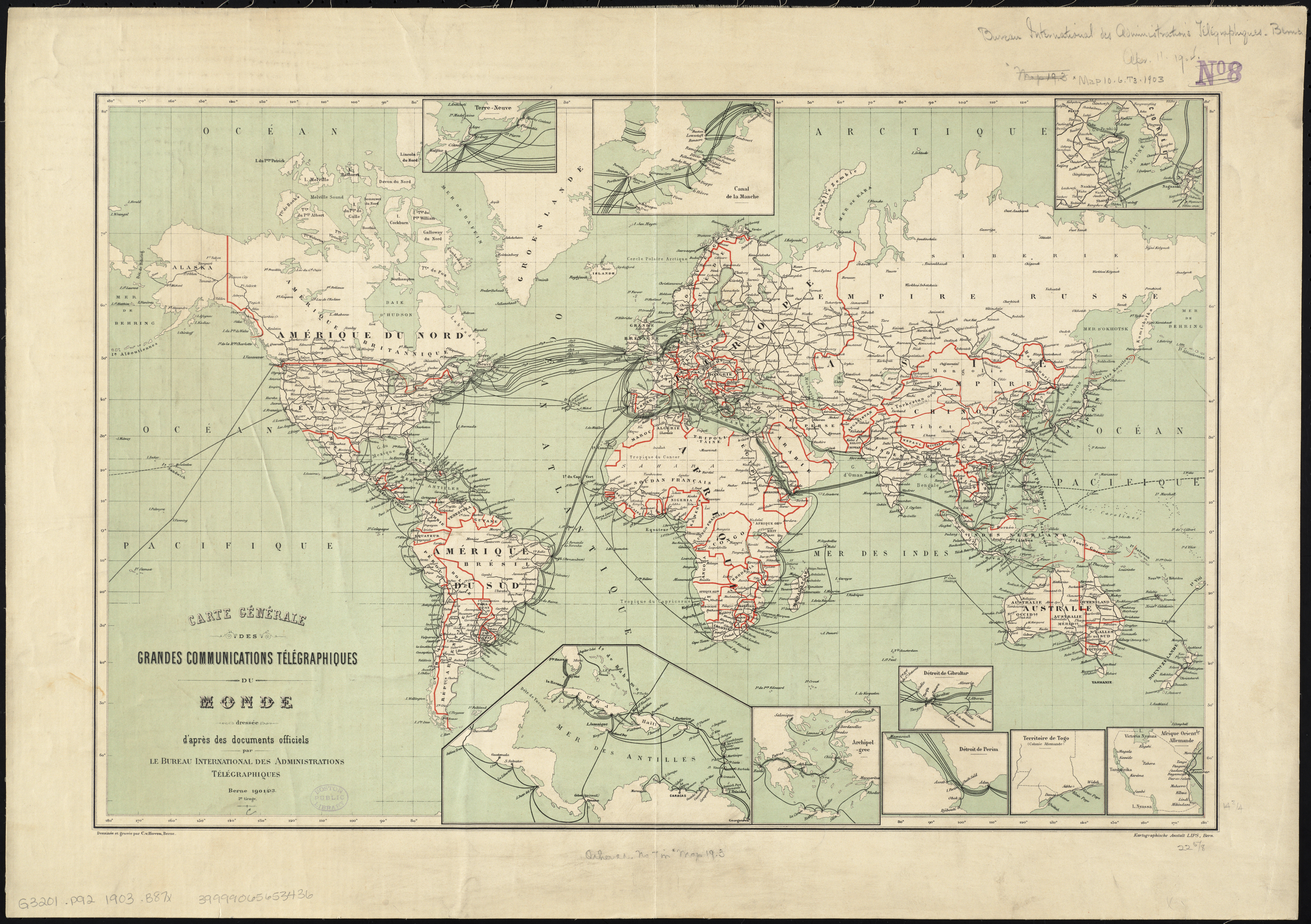 titre: Carte générale des grandes communications télégraphiques du monde dressée d’après des documents officiels par le Bureau International des Administrations Télégraphiques. Berne 1901/03. 2e. tirage. Dessinée et gravée par C. v. Hoven, Berne. Kartographische Anstalt LIPS, Bern. Author: International Telegraph Bureau (Bern, Switzerland) Publisher: International Telegraph Bureau (Bern, Switzerland) Date: 1901 Location: World Height: 29 cm (11.4 in); Width: 39 cm (15.3 in) dimensions QS:P2048,29U174728;P2049,39U174728 Scale: [ca. 1:70,000,000] Call Number: G3201.P92 1903 .B87x